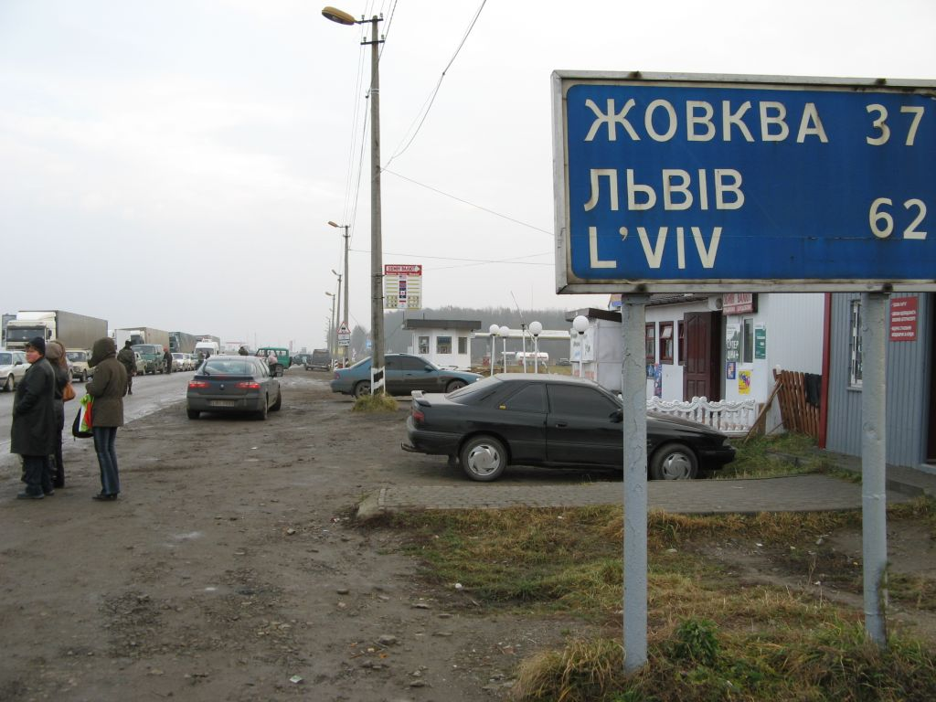 Droga magistralna M09 na Ukrainie, tuż za przejściem granicznym Hrebenne — Rawa Ruska.